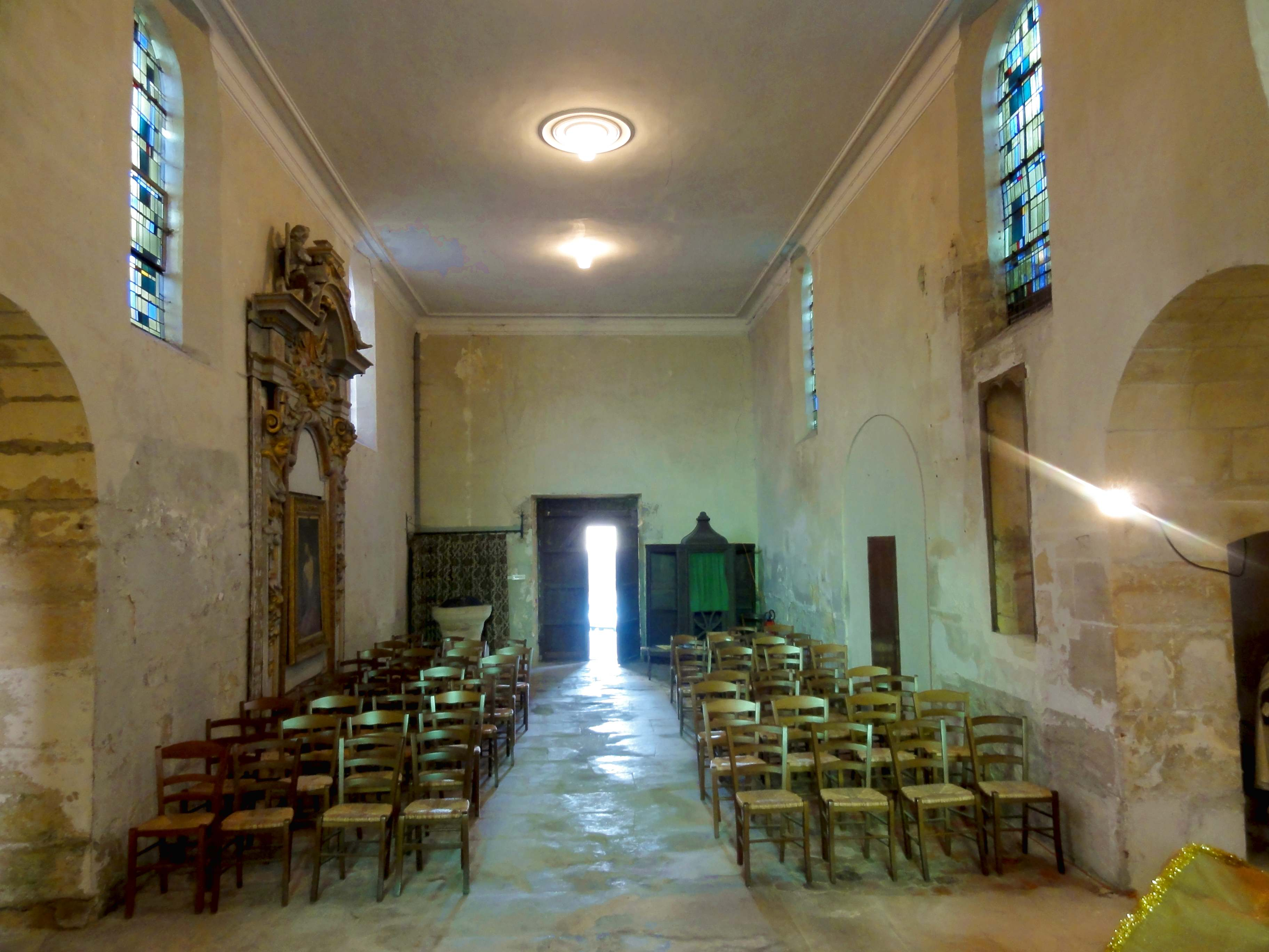 Intérieur de l'église - voir titre.